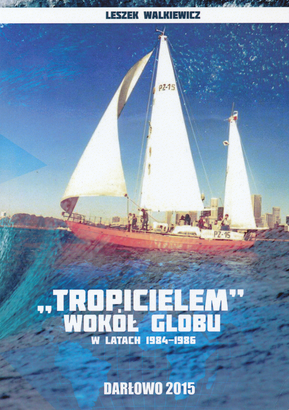 Okładka książki Leszka Walkiewicza "Tropicielem wokół globu"